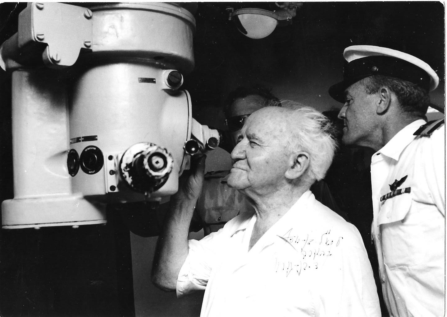 סא"ל אהרון בן יוסף מארח את דוד בן גוריון מבקר בביתן חיל הים בתערוכת צה"ל